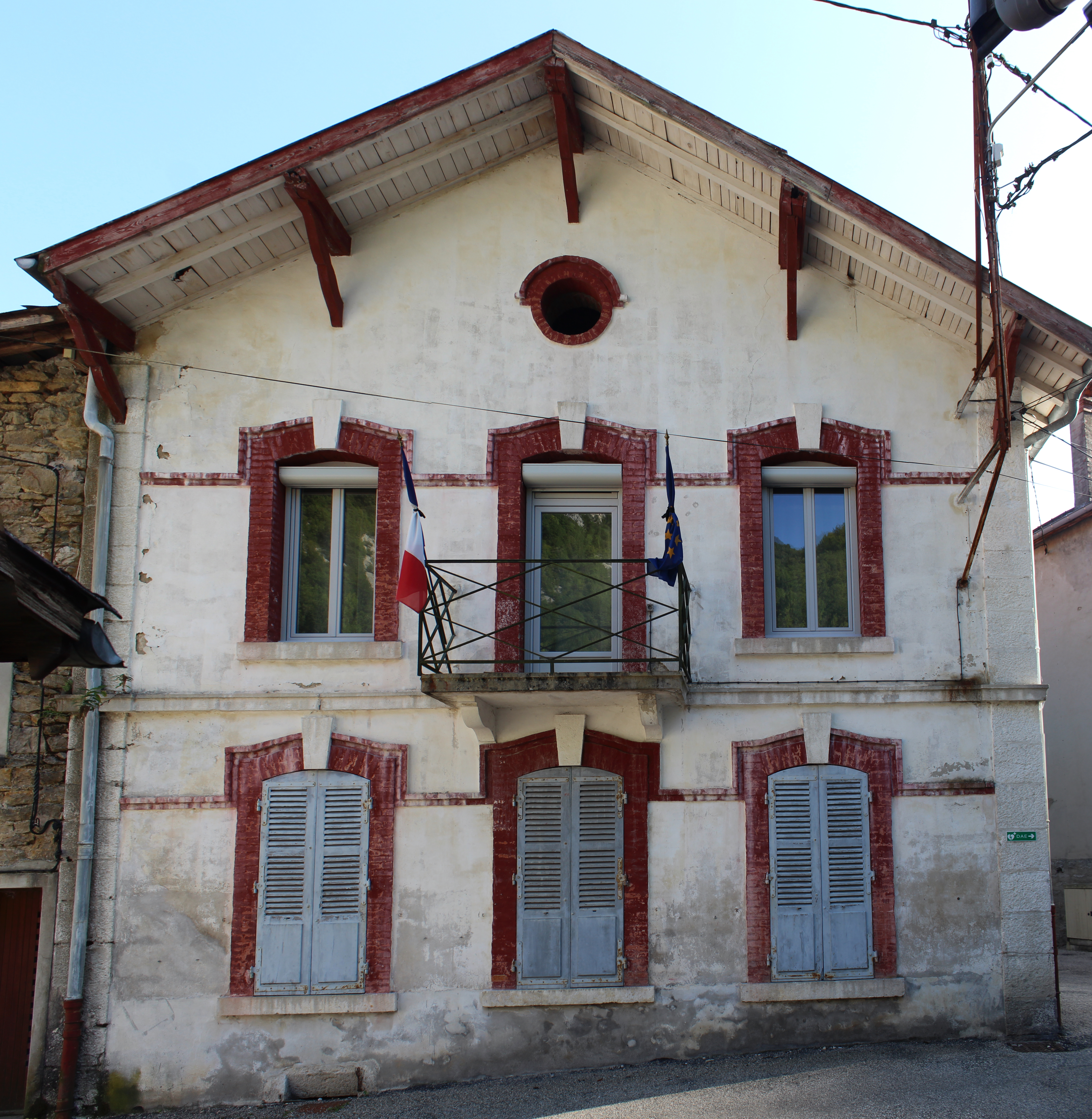 Mairie de Chaley.